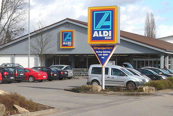 Aldi Süd, Trier